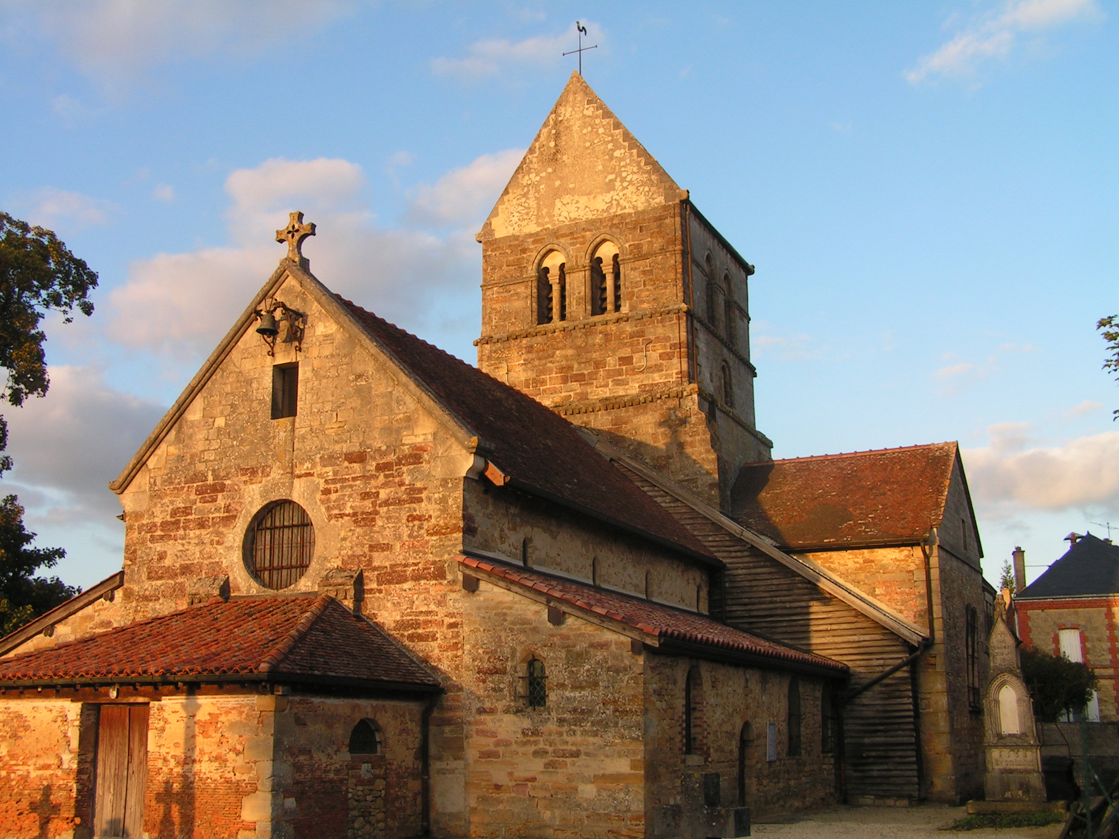 Église de l'Assomption de Blesme (Classé) .